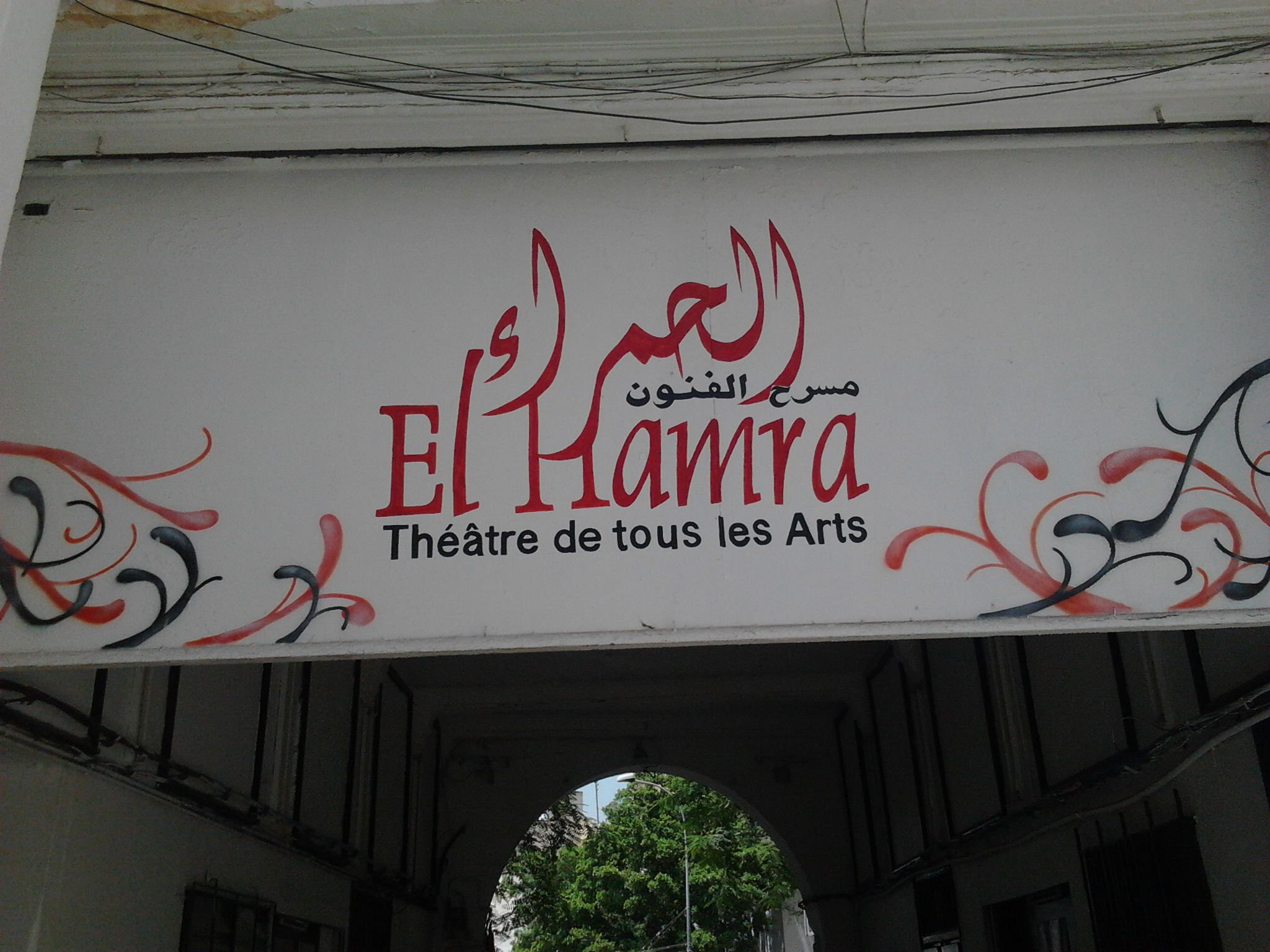 Théâtre "Al Hamra" (Alhambra) - Bab Al Jazira - Al Khirba - Tunis